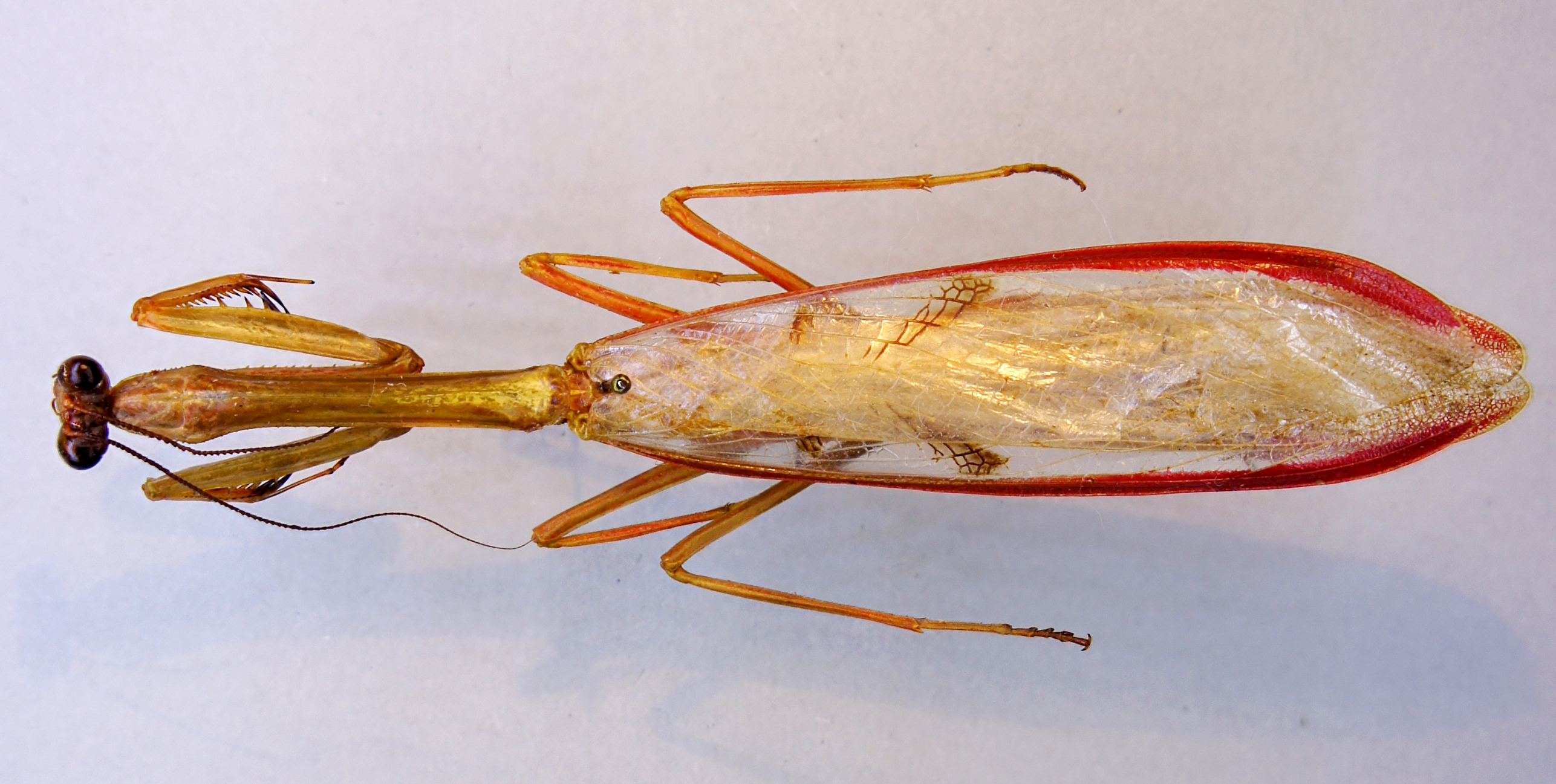 Stagmatoptera flavipennis (Serville, 1839) ♂ Herkunft: Peru, Panguana